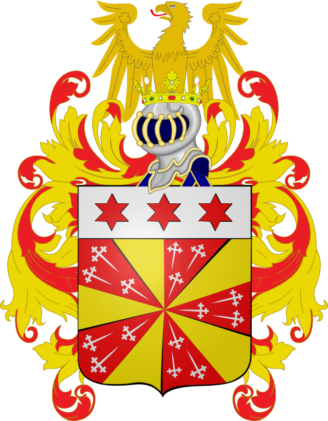 Gironné de gueules et d'or de dix pièces, chaque giron de gueules chargé de trois croix recroisettées au pied fiché d’argent ; au chef d’argent chargé de trois étoiles à six rais de gueules. Heaume : d'argent, couronné, grillé, colleté et liseré d'or, fourré et attaché d'azur. Cimier : une aigle naissante d’or. Lambrequins : d’or et de gueules.